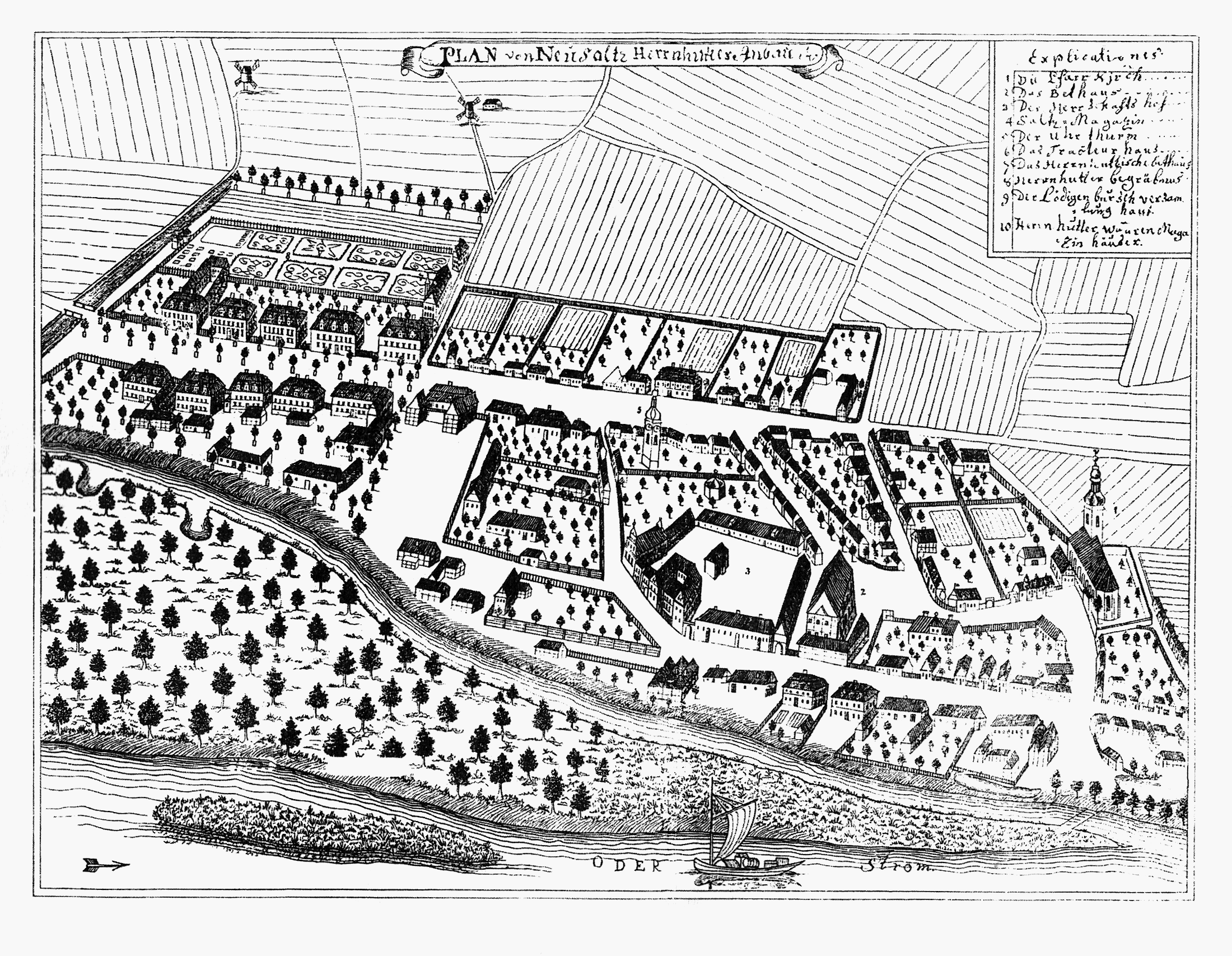 Widok Nowej Soli na rysunku F.B.Wernera, XVIII w.